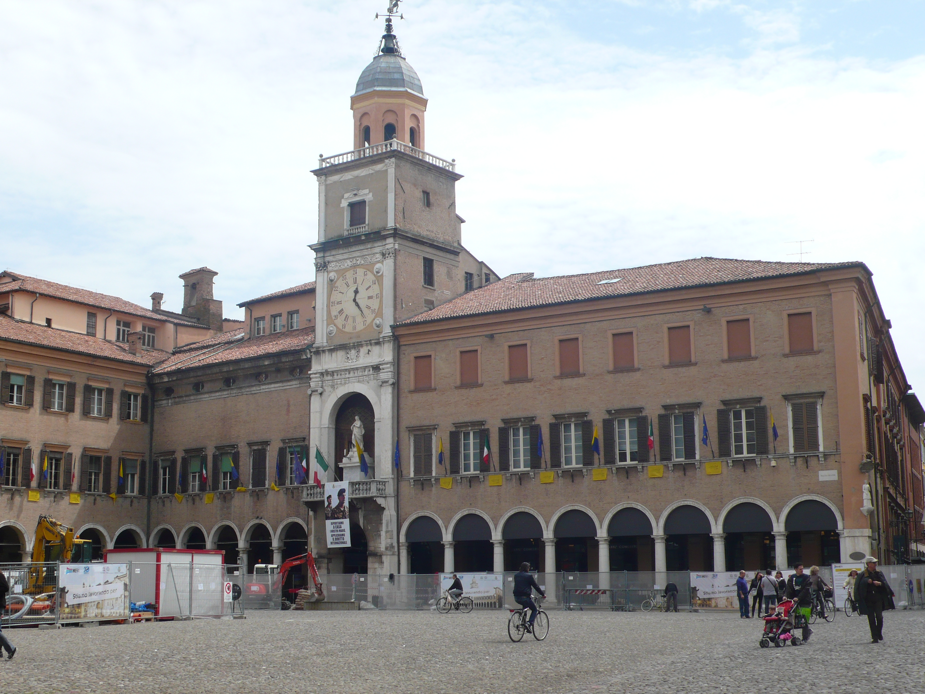 Palazzo Comunale This is a photo of a monument which is part of cultural heritage of Italy.